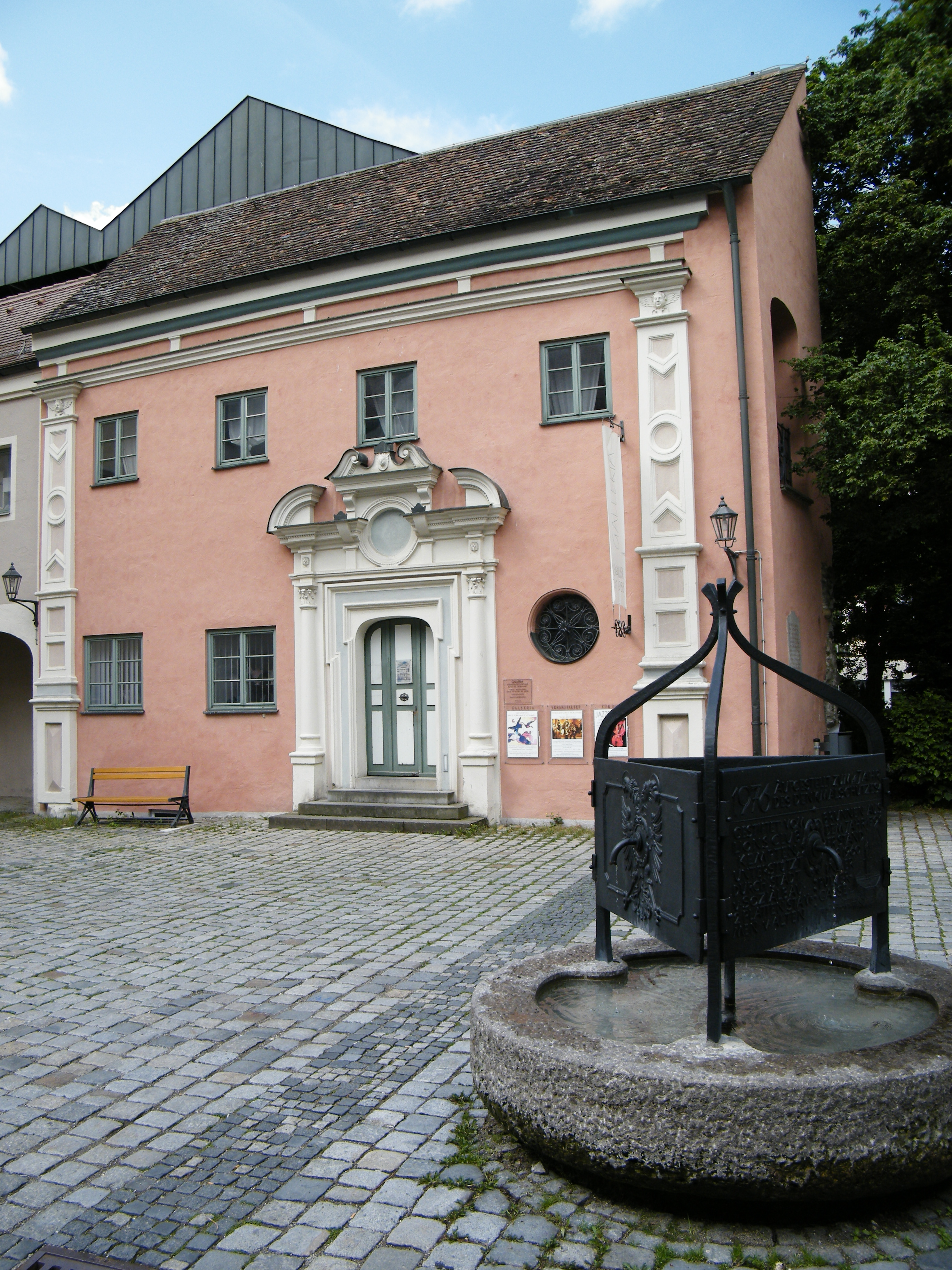 Müßigengelzunfthaus mit Brunnen des Bildhauers Hans Wachter